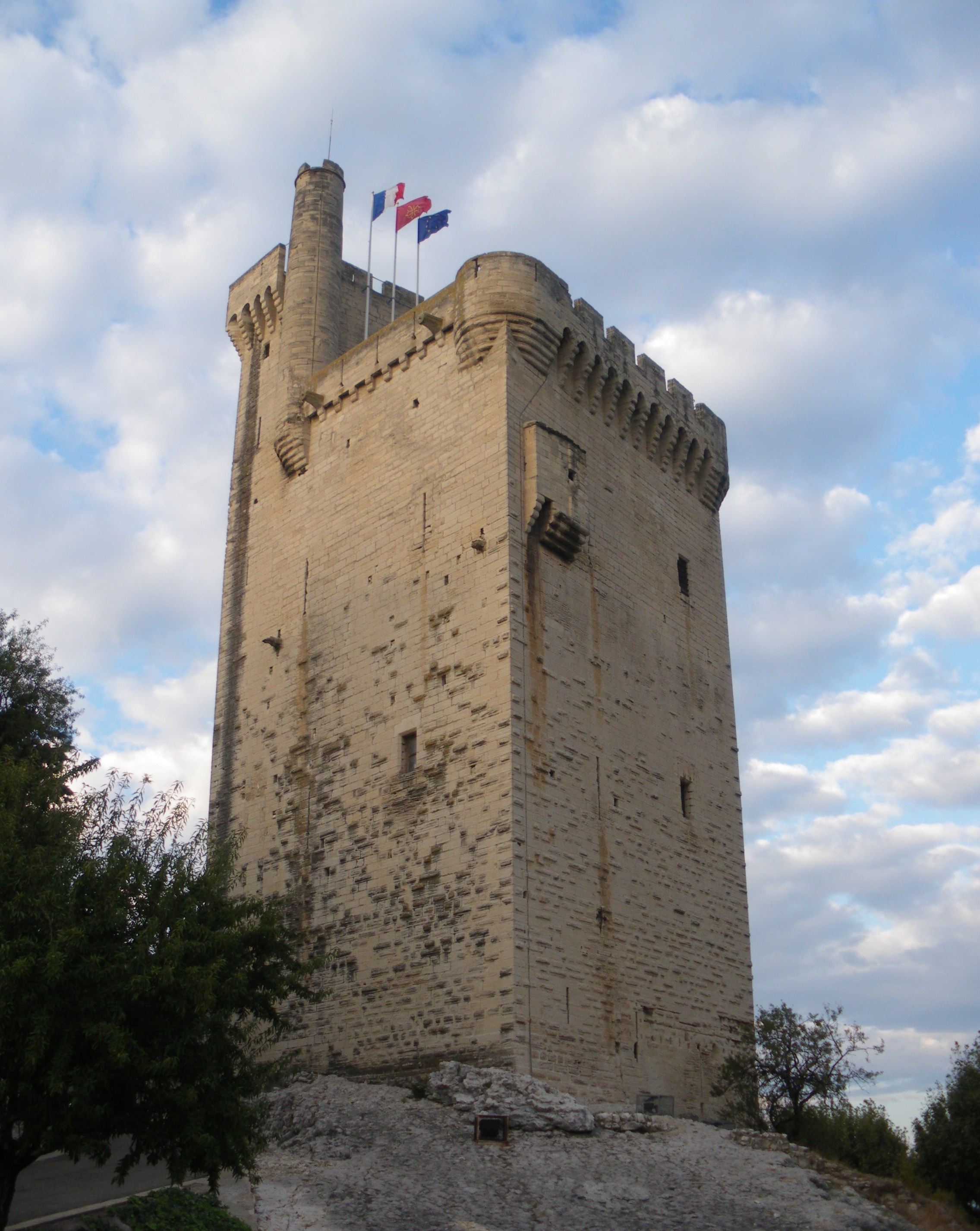 Tour Philippe le Bel, Villeneuve lès Avignon, Gard. Ancien point d'arrivé du Pont St Bénézet d'Avignon.